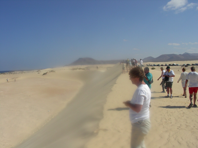 Fuerteventura, Sanddünen bei Corralejo (Spanien)